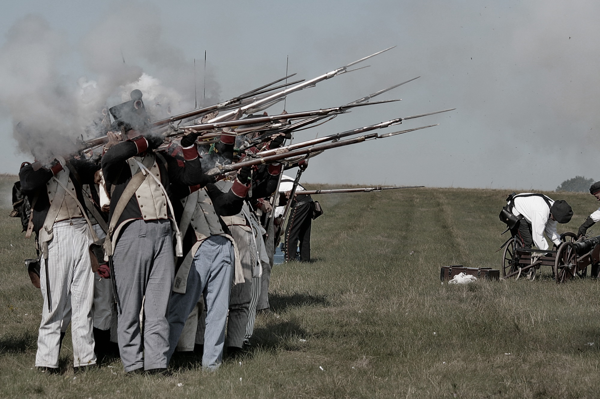 Nachstellung der Schlacht an der Göhrde von 1813 an den Steinker Höhen, Göhrde, Niedersachsen, Deutschland